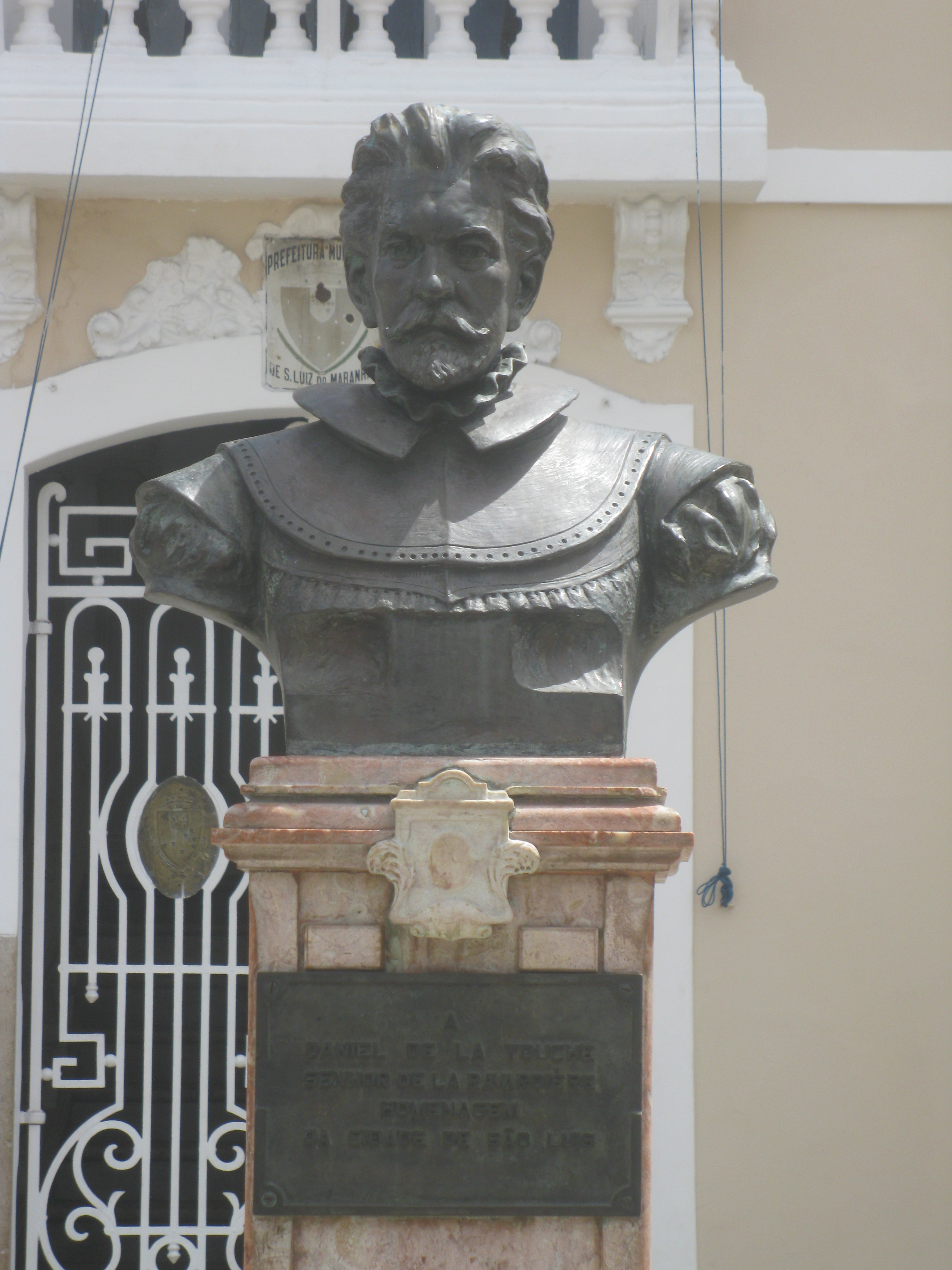 Busto de Daniel de la Touche em frente à prefeitura de São Luís.